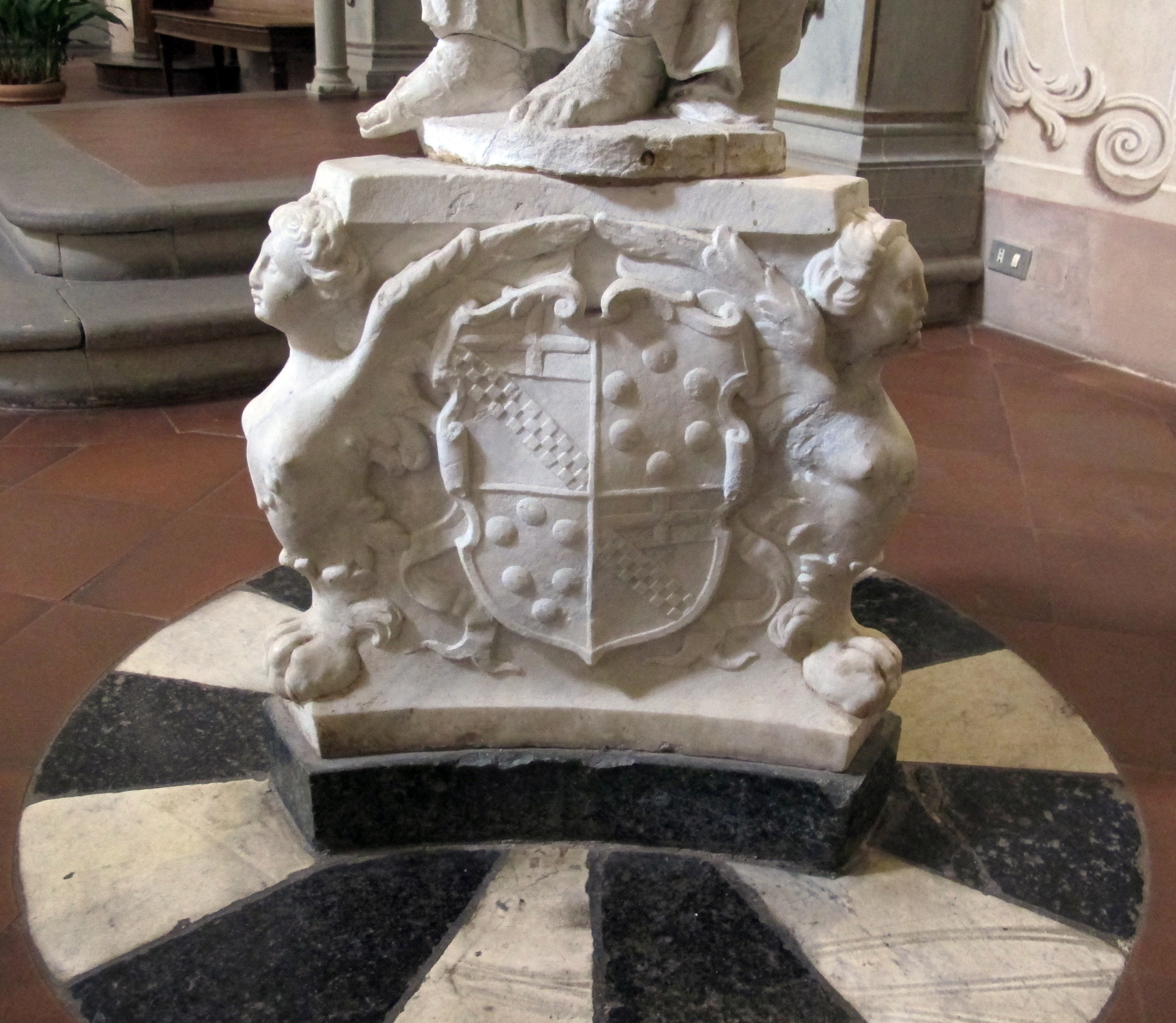 San Bartolomeo a Monte Oliveto - Firenze